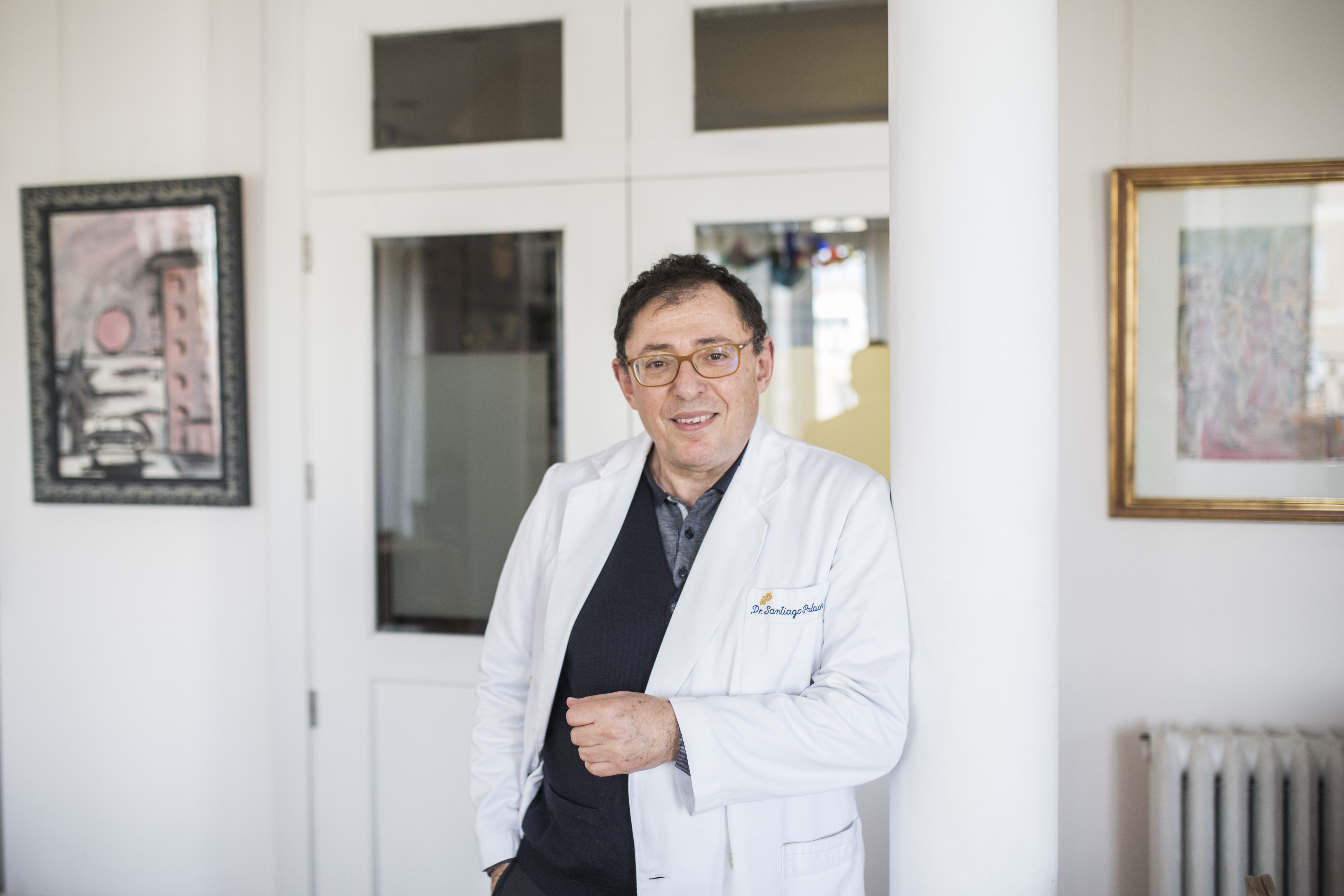 El Dr.Palacios ha contribuido a más de 400 libros y artículos de revistas